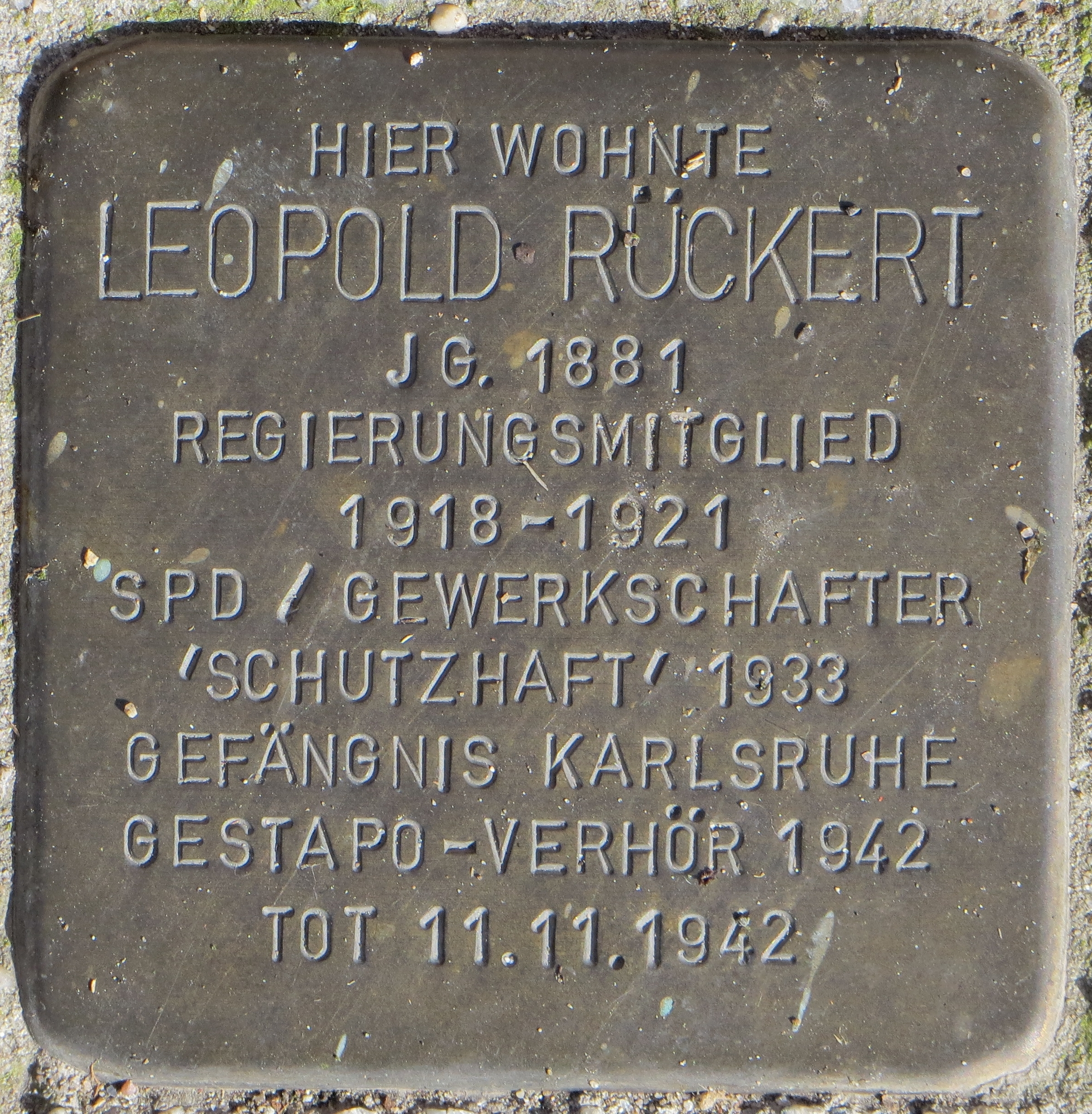 Stolperstein für Leopold Rückert vor dem Haus Ettlingerstraße 45 Karlsruhe